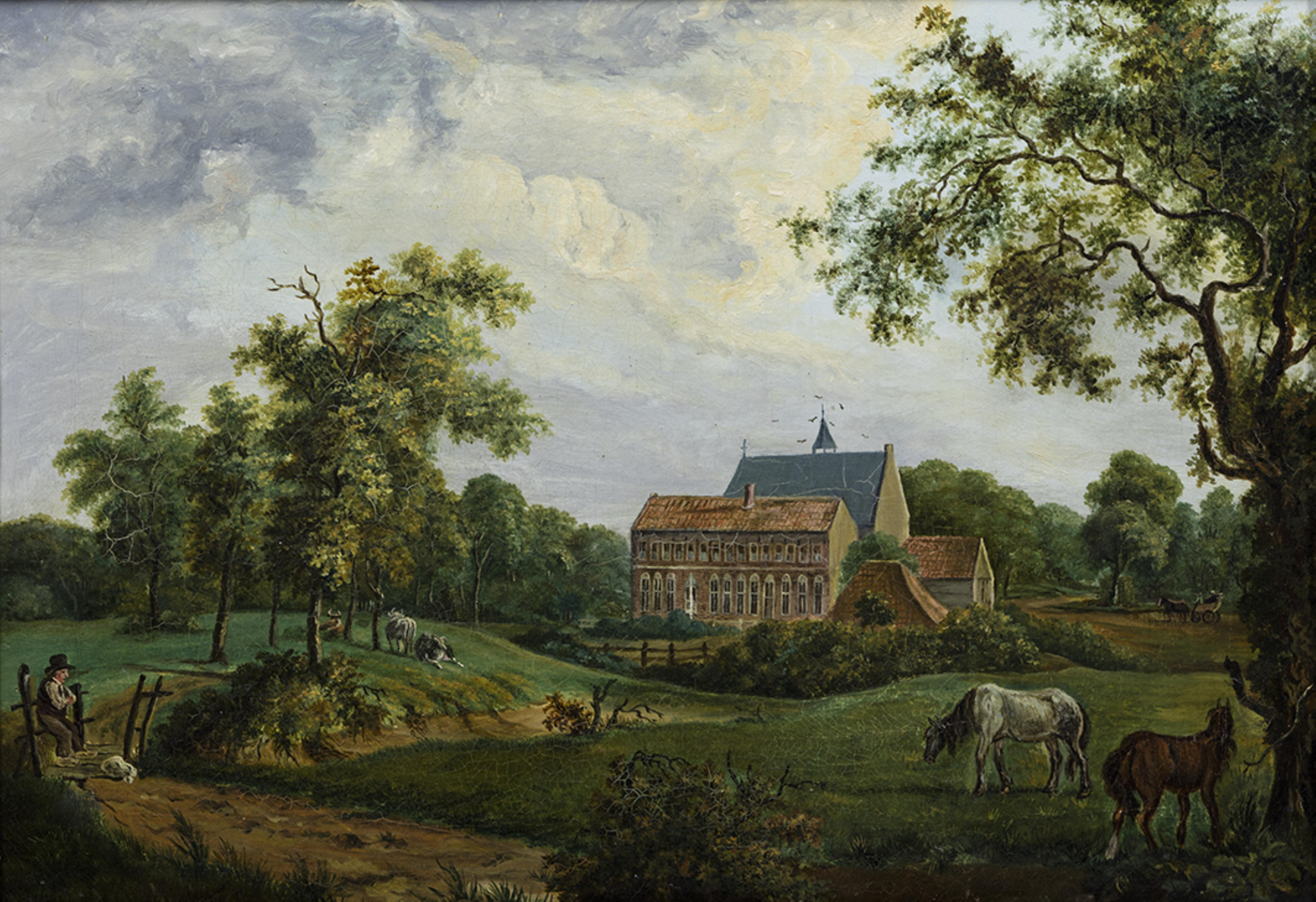 Klooster Ter Apel met de oorspronkelijke bovenverdieping op de Noordvleugel, een jaar voor de afbraak in 1834. Destijds was het koor van de kerk in gebruik als hervormde kerk en werd het schip gebruikt als opslagruimte. De predikant woonde in de oostelijke vleugel en in de noordelijke vleugel bevond zich een school en een (eenkamer)woning voor de koster- schoolmeester. Tegen de westgevel staat een turfschuurtje.